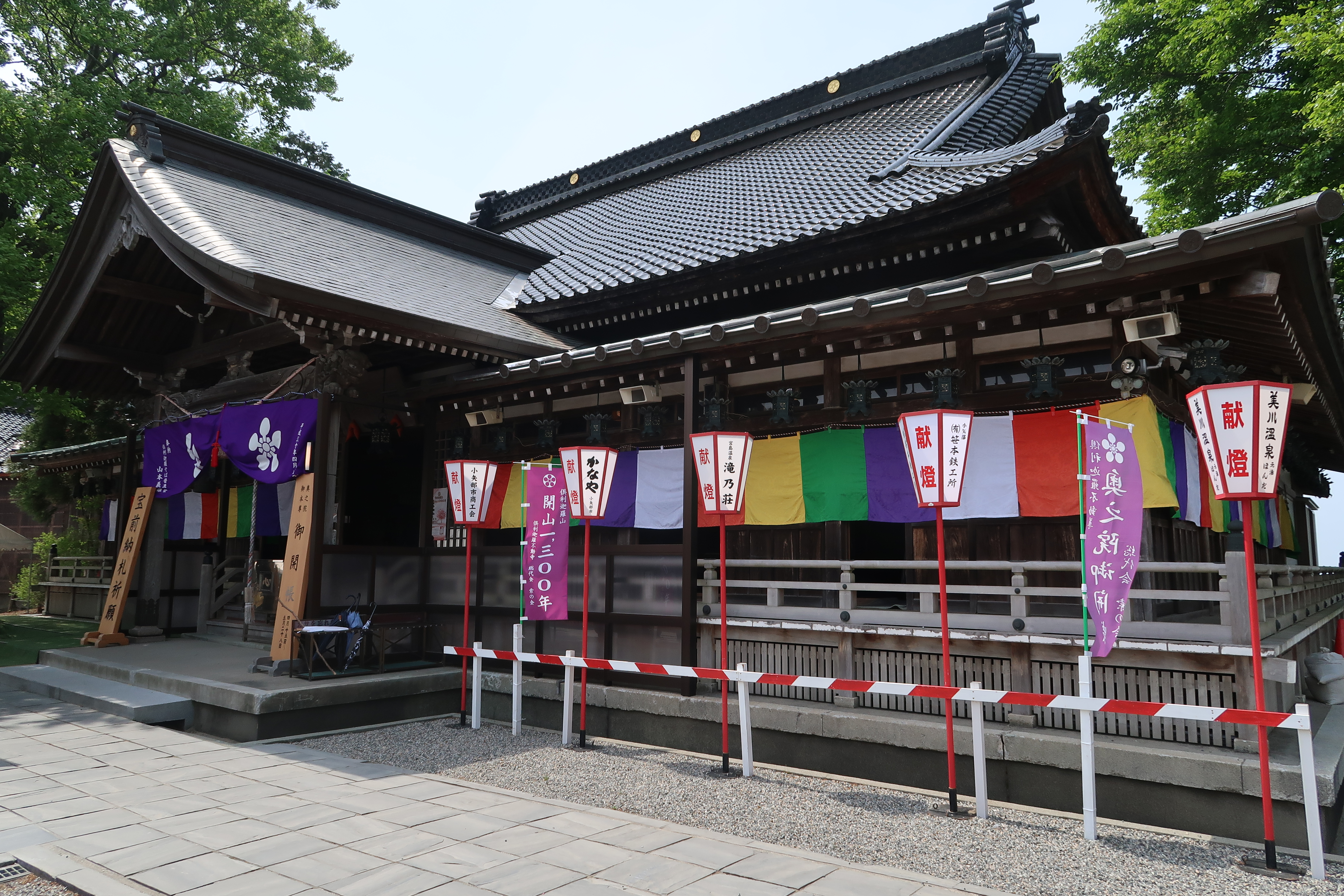 倶利迦羅不動寺 開山1300年 春のご開帳